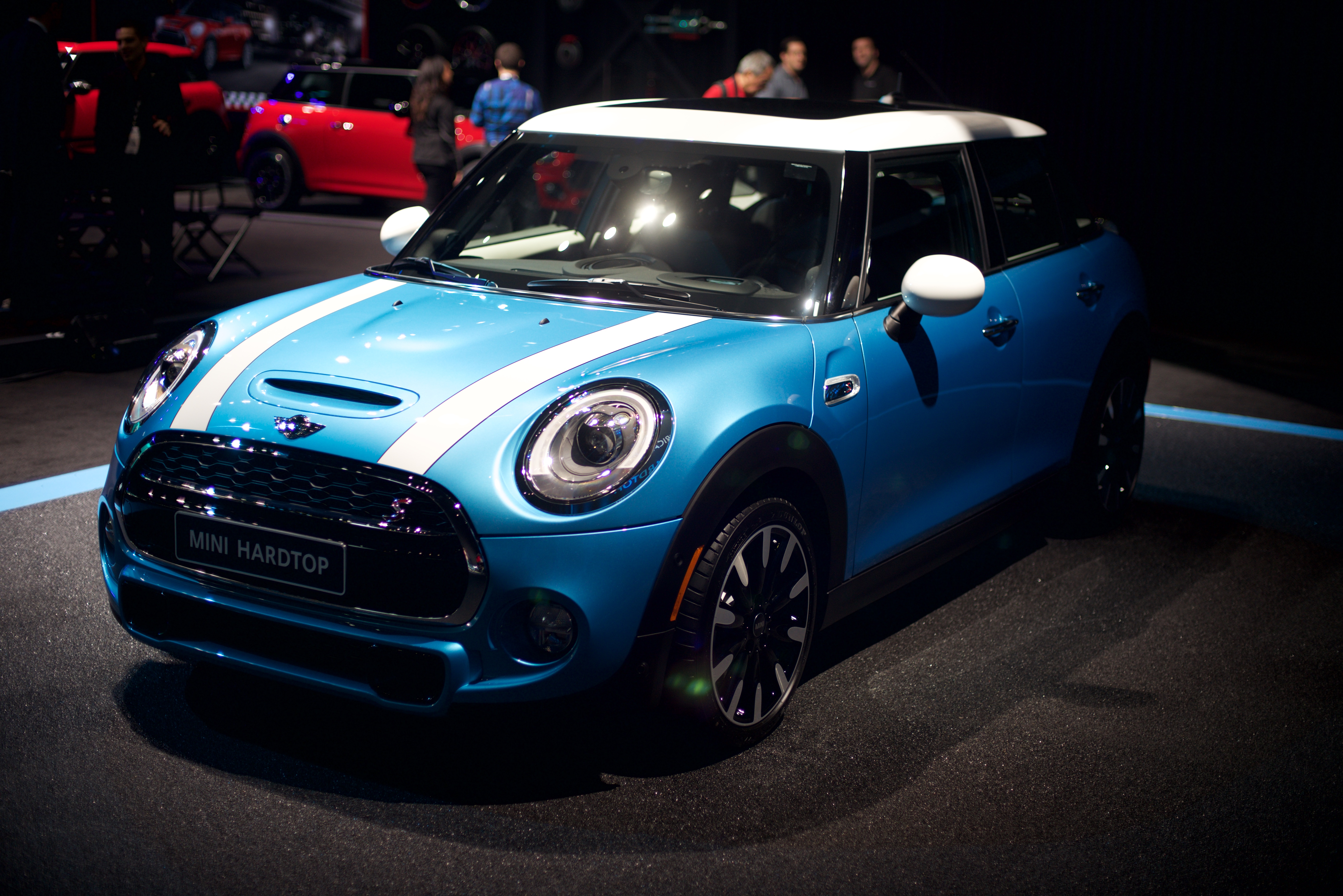 SLY_5767